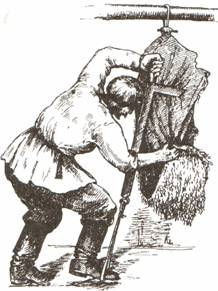 Ukrainischer Kürschner mit Schaffell